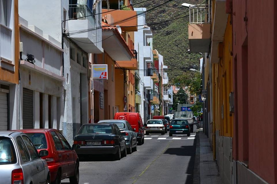 Calle San Juan Evangelista en el barrio de María Jiménez